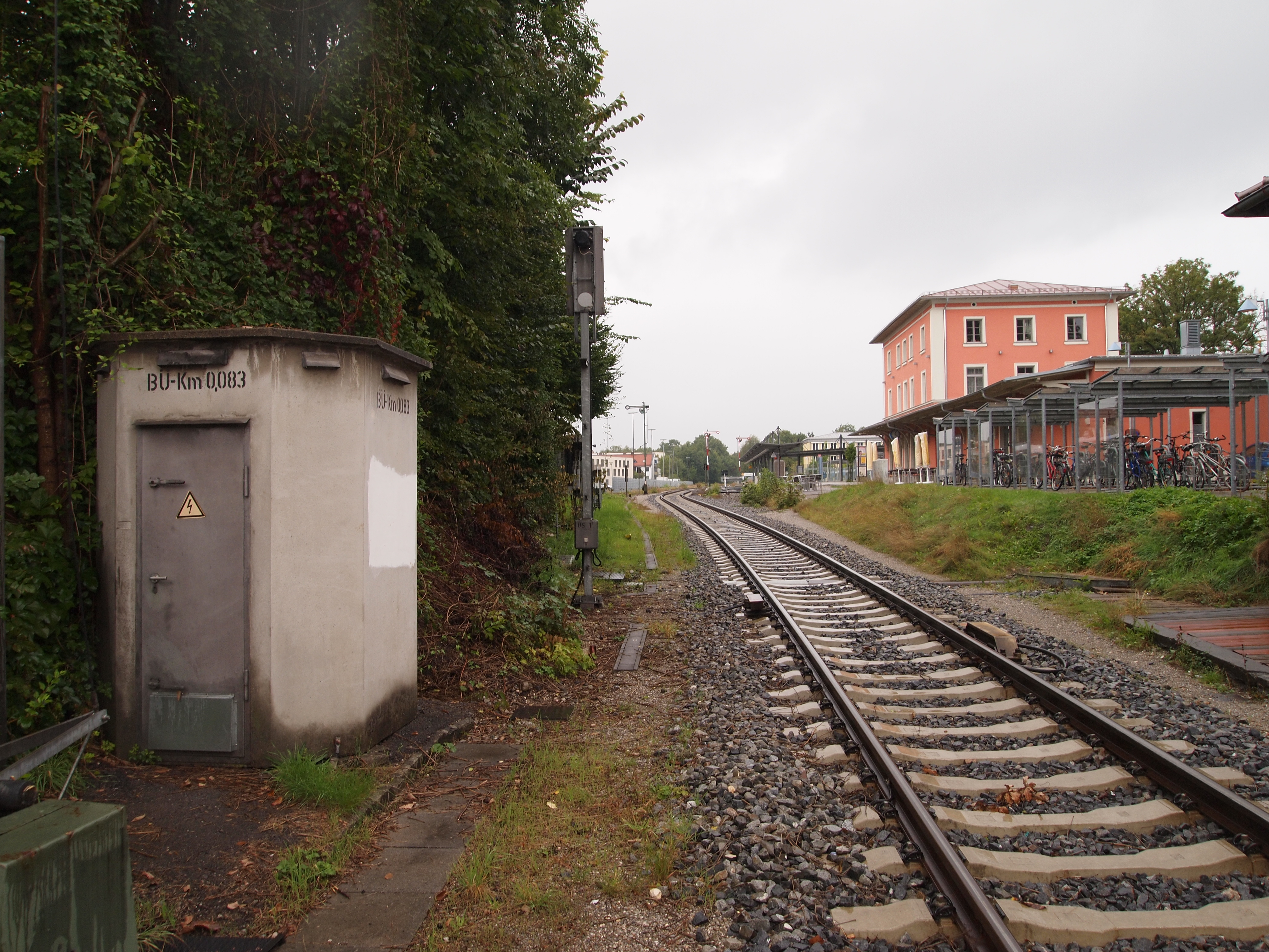 Bahnübergang auf KM 0,083 der Bahnstrecke Landsberg am Lech-Schongau von der Katharinenstraße aus. Blick Richtung Kaufering. Links Steuerhäuschen der Schranken, rechts im Hintergrund das Bahnhofsgebäude mit Fahrradständern.